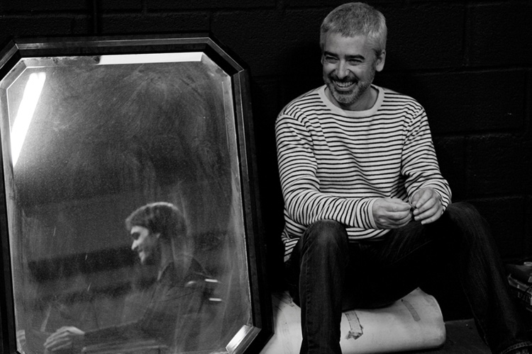 Jokin Oregi aktorea, antzerki-zuzendaria eta antzerkigilea